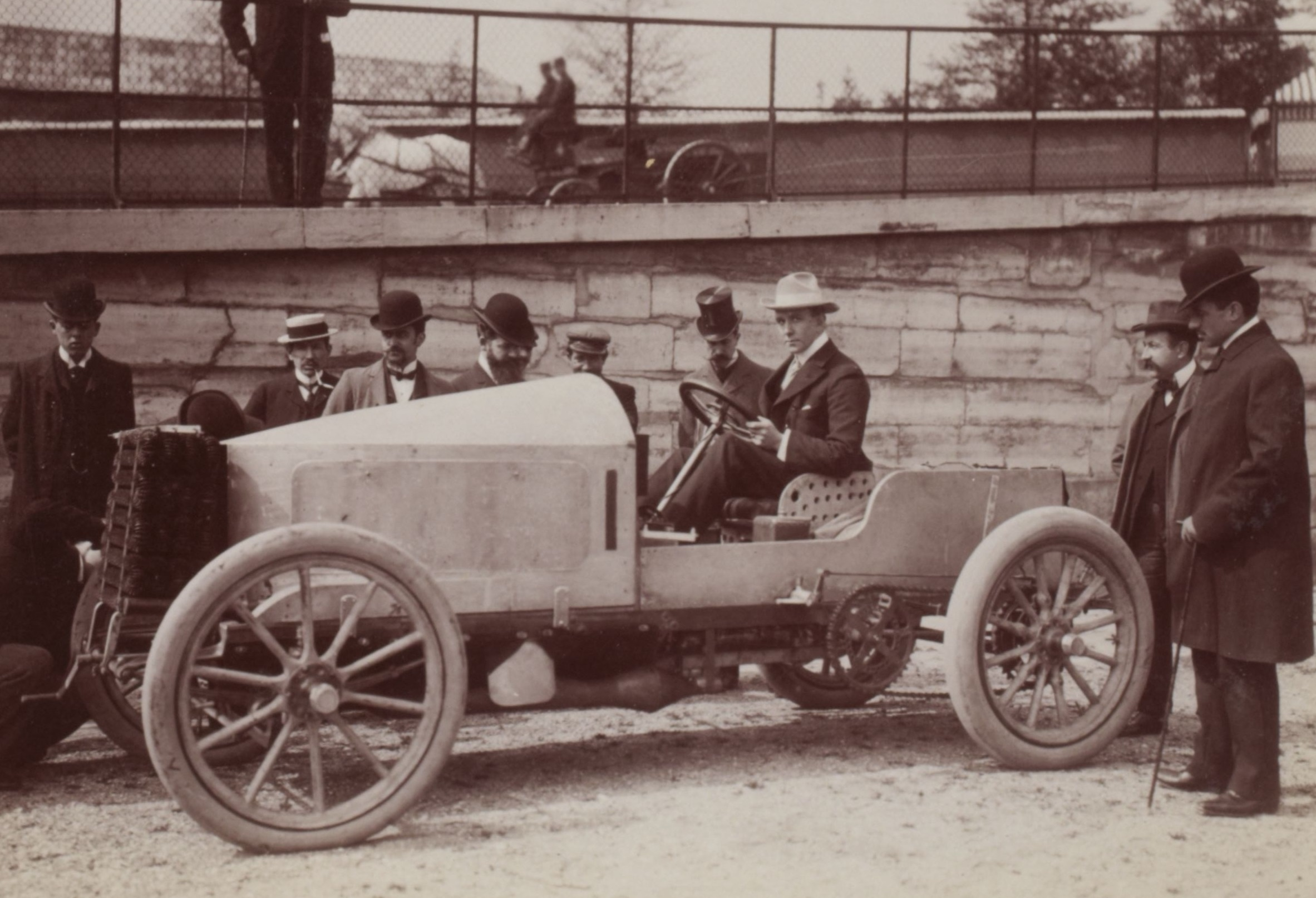 [Collection Jules Beau. Photographie sportive] : T. 21. Année 1903 / Jules Beau : F. 35. [Paris - Madrid, Tuileries, 19 - 22 mai 1903]